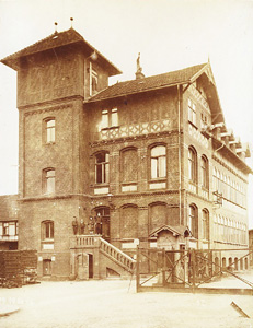 Fabrikgebäude der Fa. J. A. John in Ilversgehofen